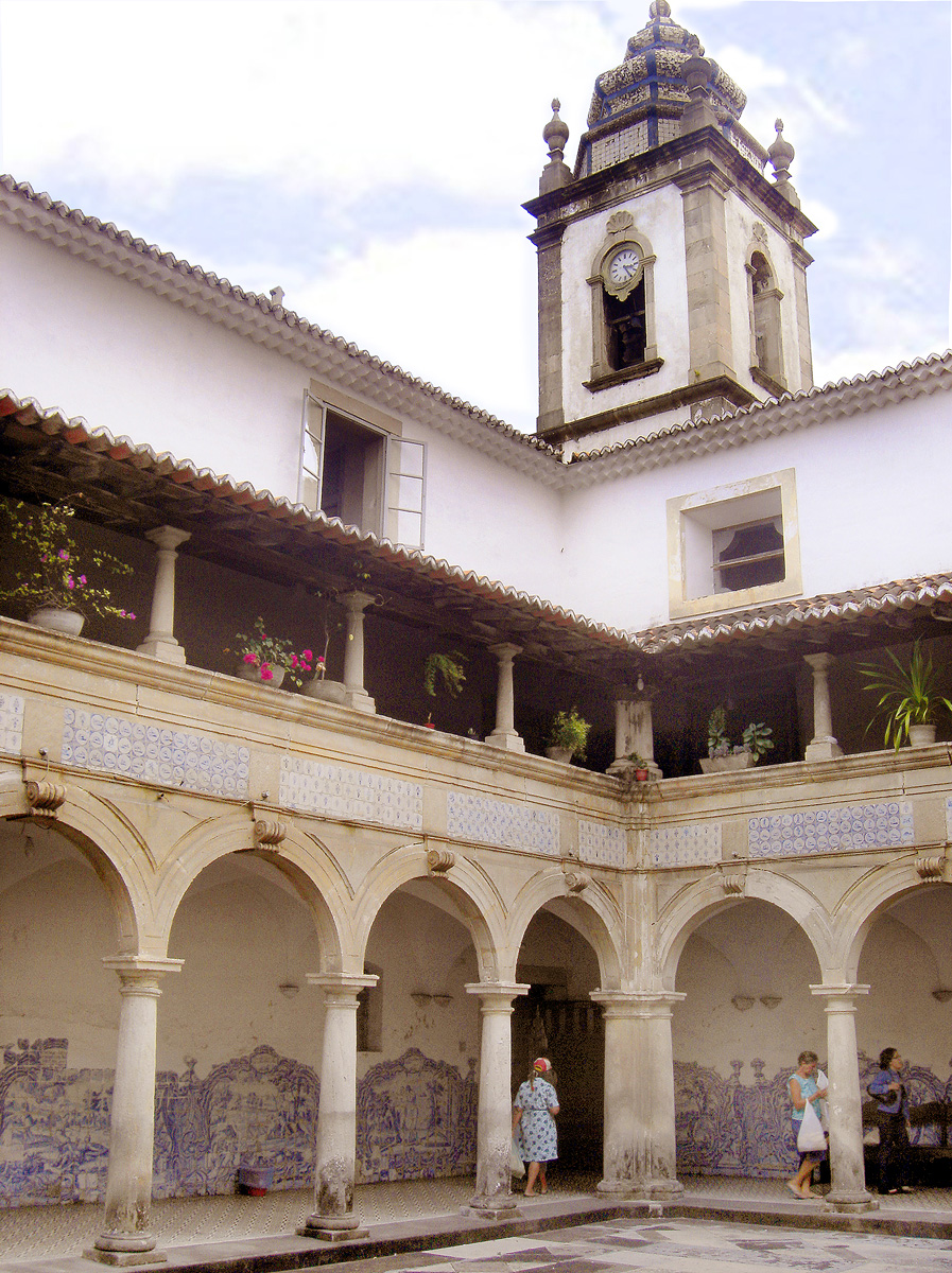 Detalhe do claustro do Convento de Santo Antônio, em Recife, Brasil.